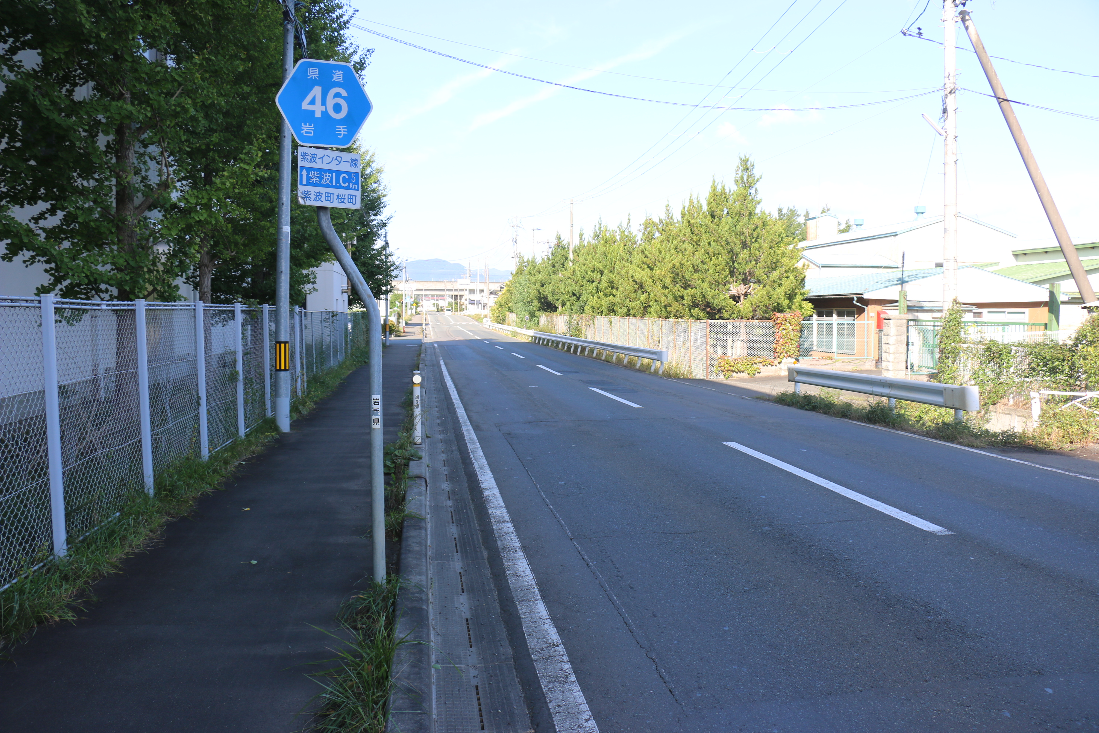 岩手県道46号線 終点付近